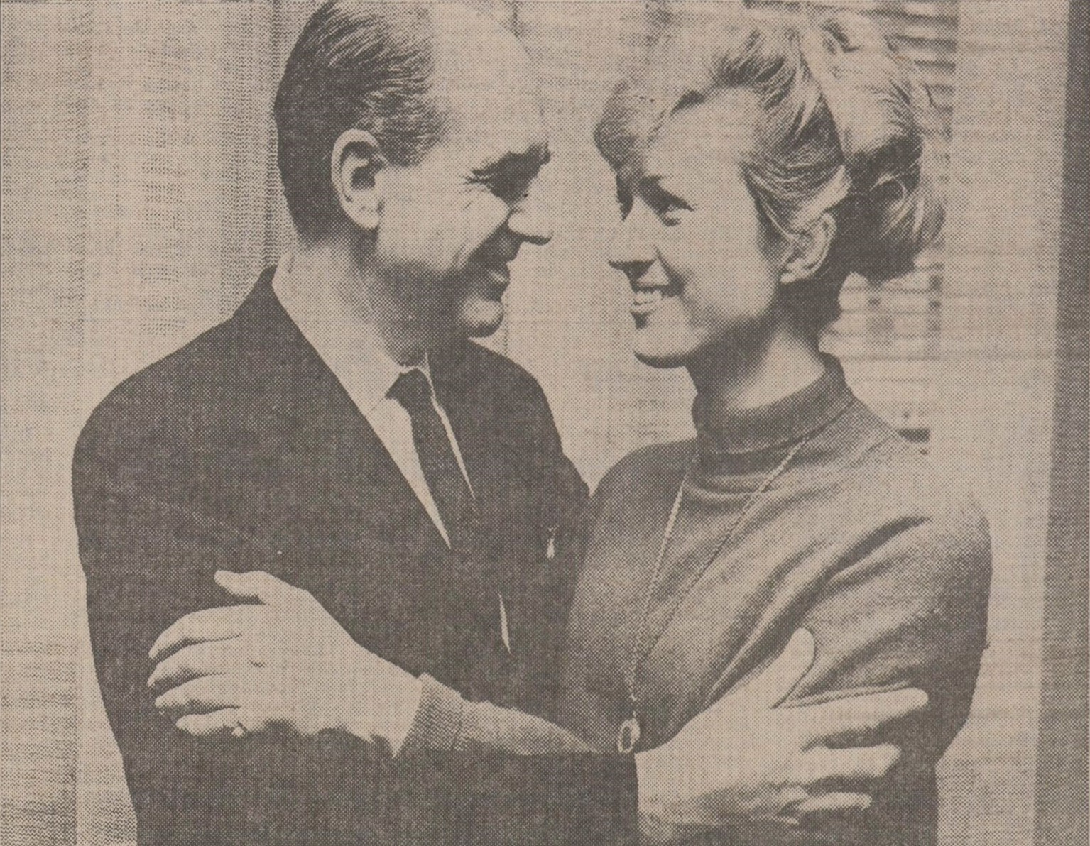 Bildtext i Aftonbladet (1968-03-07): "Ragna Nyblom, skådespelerska vid Malmö Stadsteater och Andreas Papandreou är gamla vänner. Därför var det helt naturligt för henne att skriva till honom när han satt åtta månader i fängelse. För honom var breven den enda hoppfulla kontakten med yttervärlden."